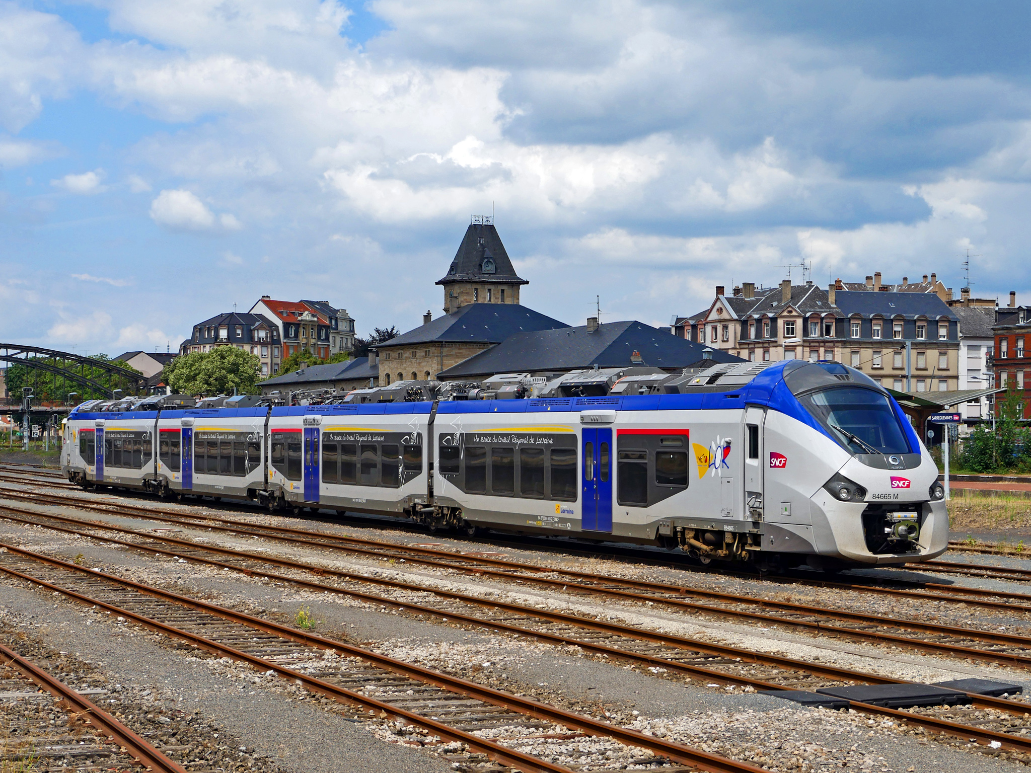 Régiolis Métrolor stationné en gare de Sarreguemines.